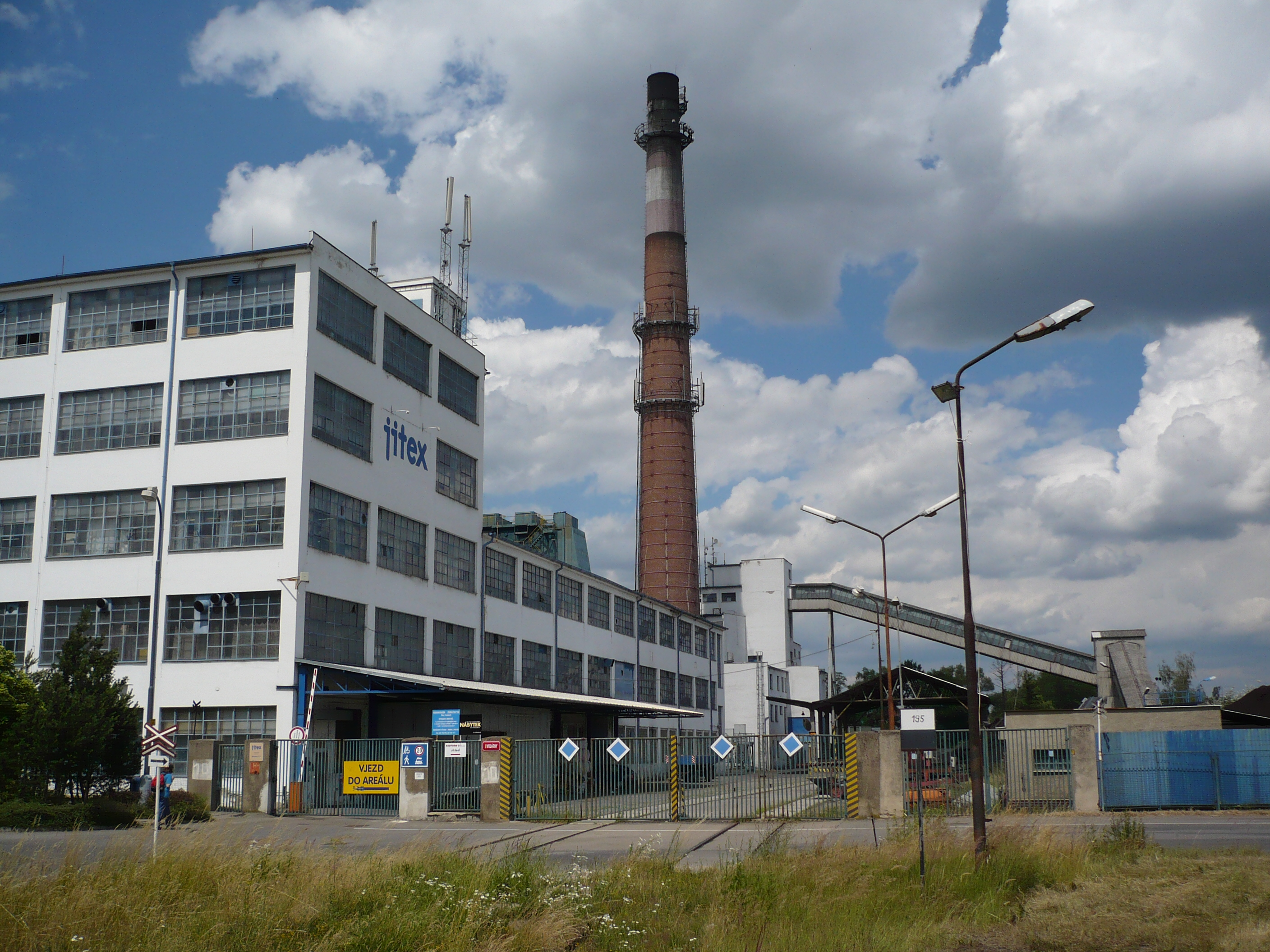 Industrial siding Jitex Písek